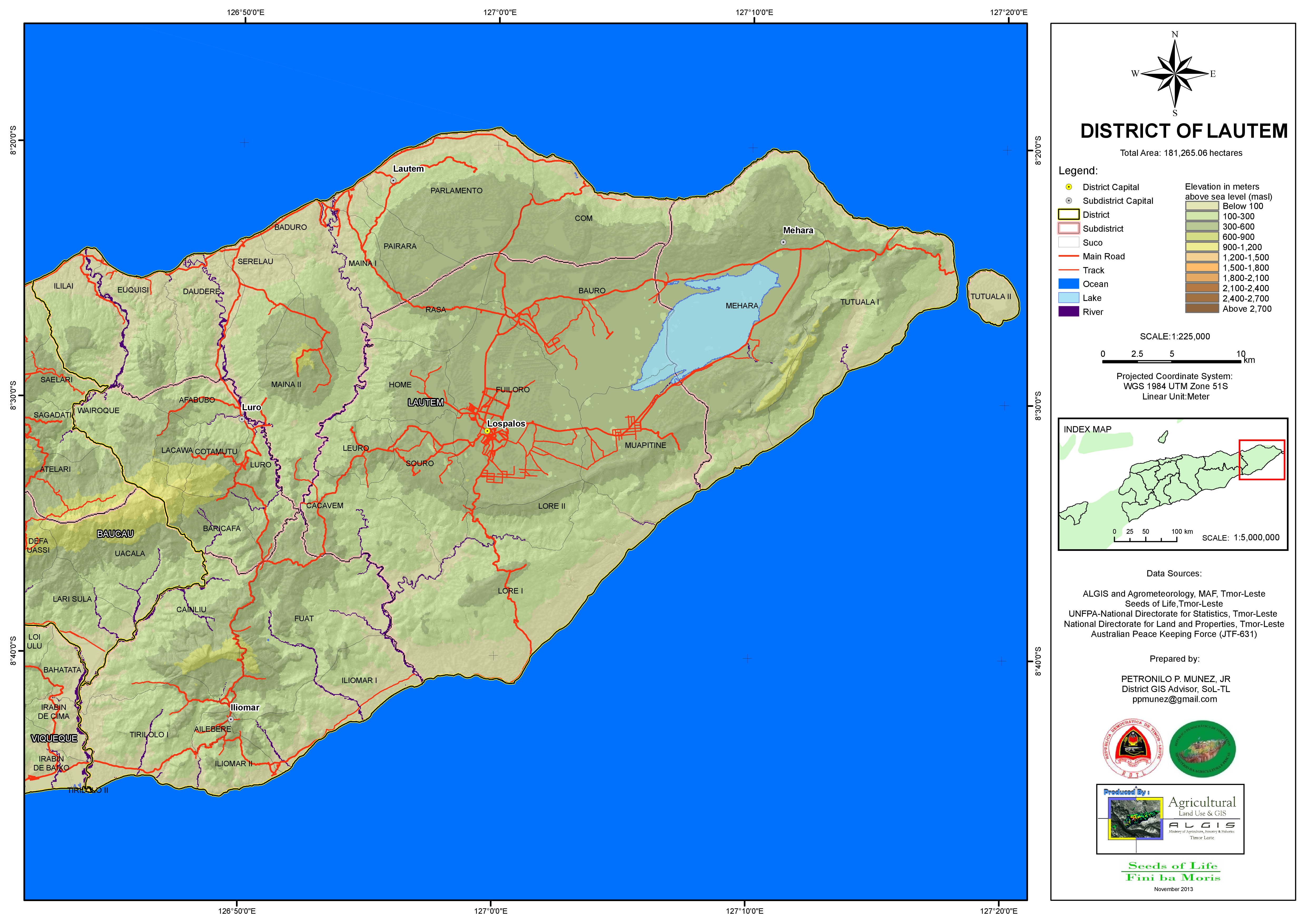 Distrikt Lautém